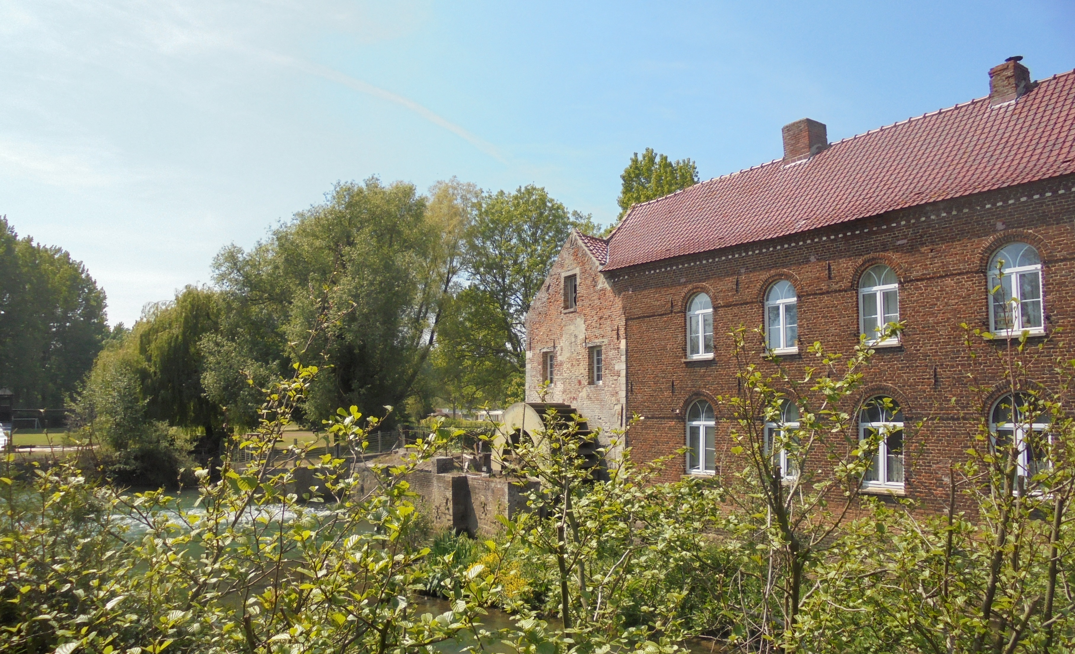 Moulin à Eau - rue du Moulin - Mametz - canton Fruges - arrondissement Saint-Omer - département Pas-de-Calais - région Hauts-de-France - France